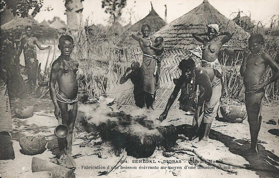 François-Edmond Fortier, Diobas. Chez les Nones. Fabrication d'une boisson enivrante au moyen d'une infusion de mil fermentée. Afrique Occidentale - Sénégal.